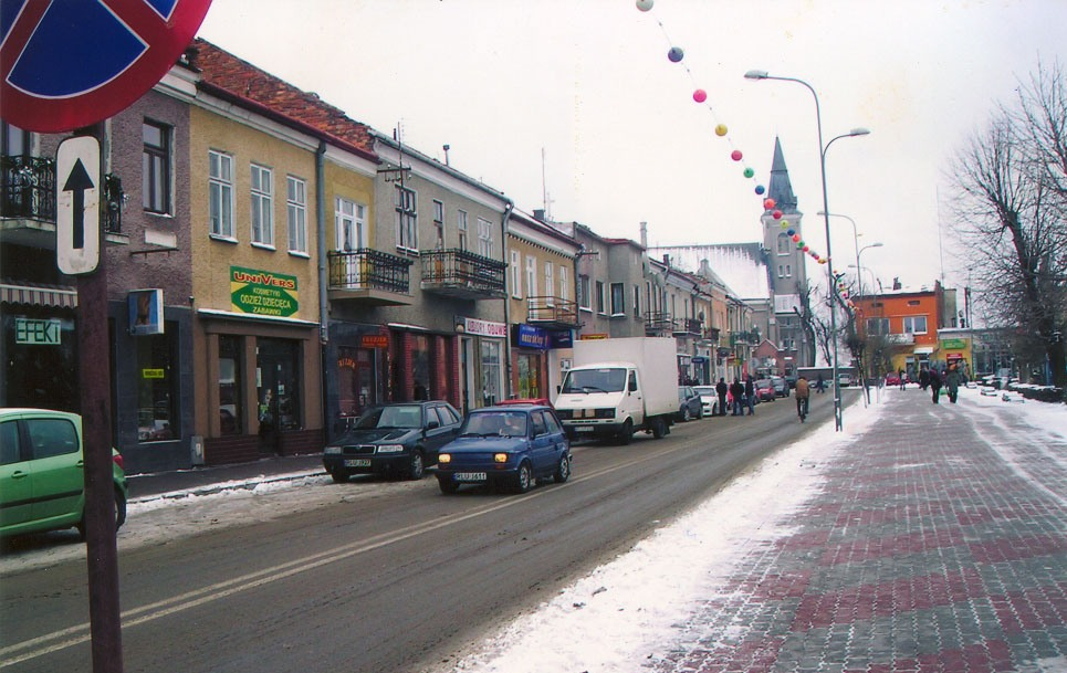 Любачів_,_ринок.: Любачів сучасний